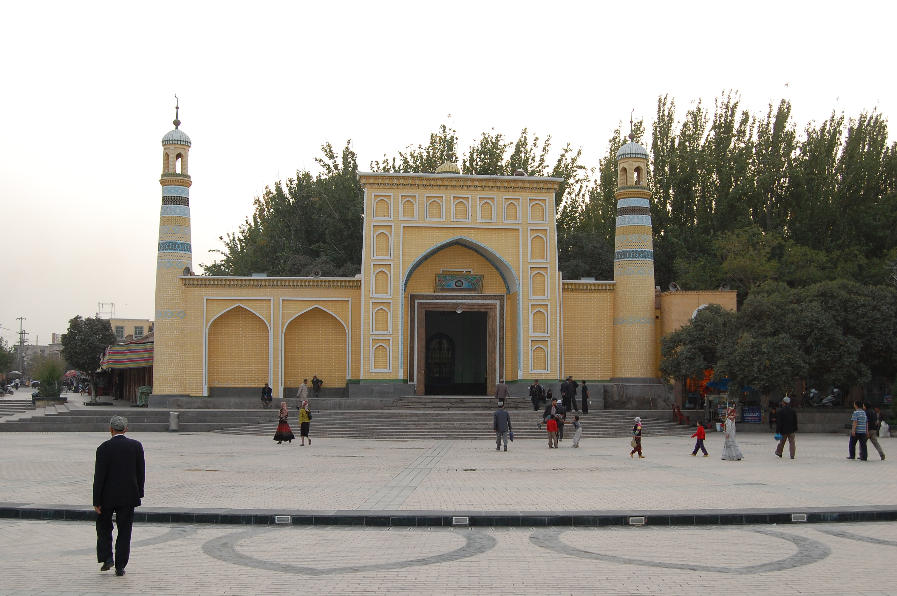 im Zentrum der Altstadt vom Kashgar die ID Kah Moschee